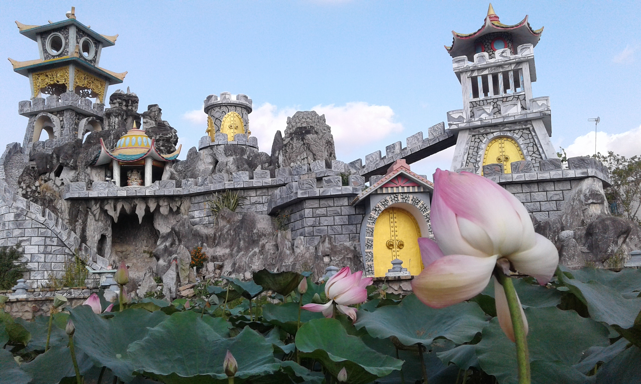 Chùa của người Hoa ngụ ở phường 8 TP Sóc Trăng